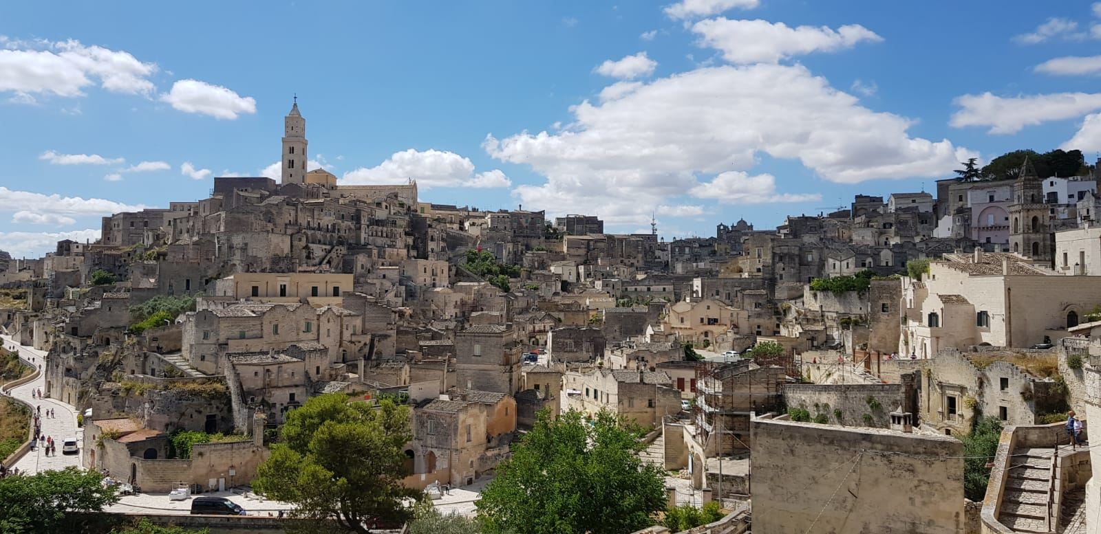 La civita e il sasso Barisano di Matera